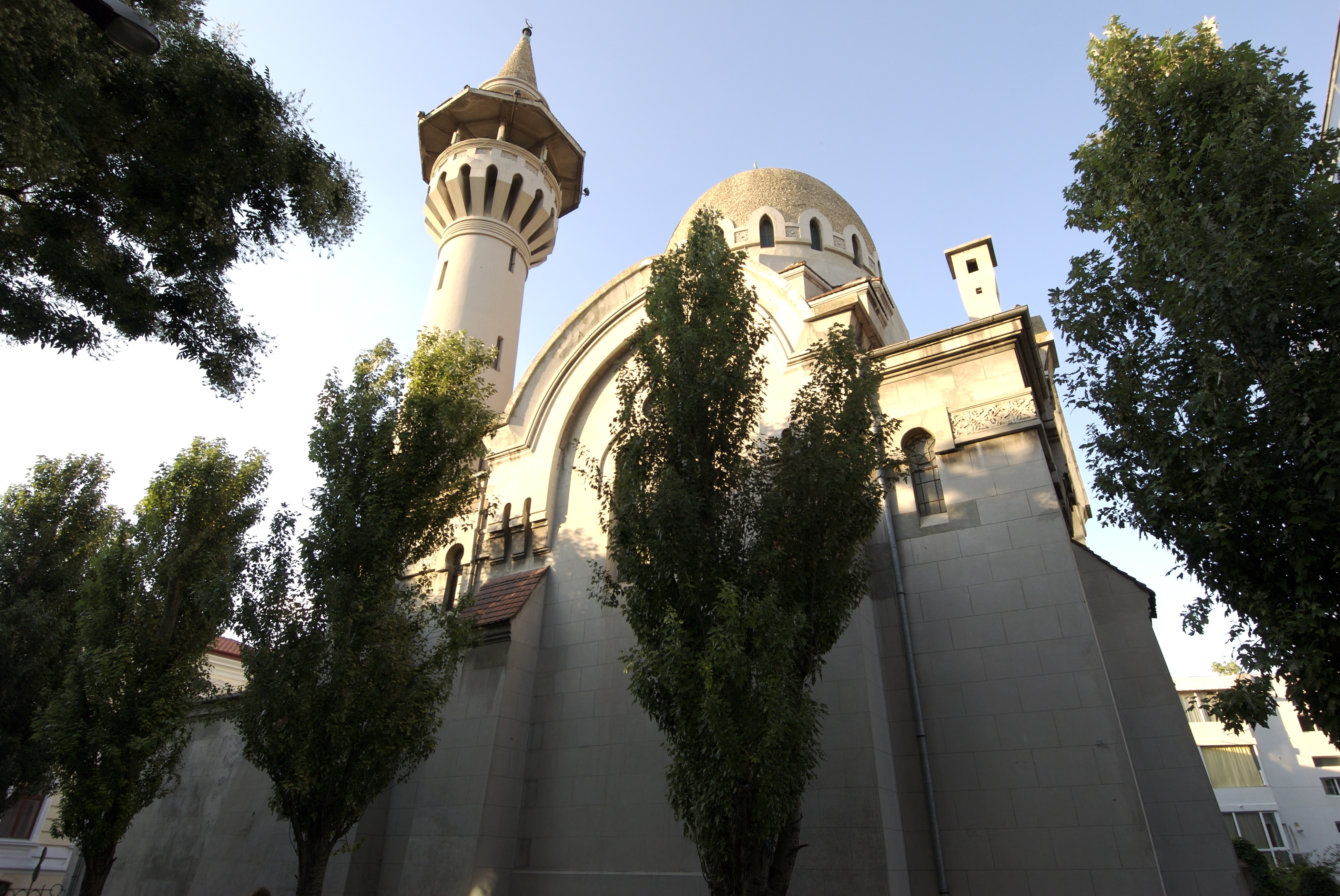 Moscheea Carol I